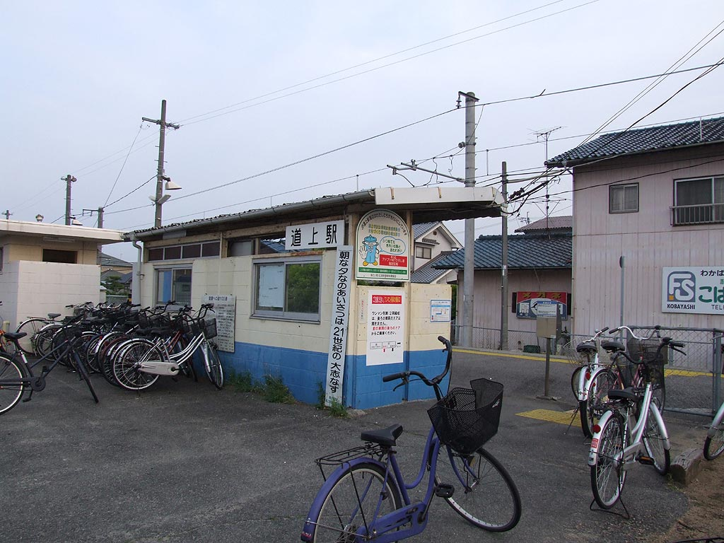 西日本旅客鉄道福塩線 道上駅